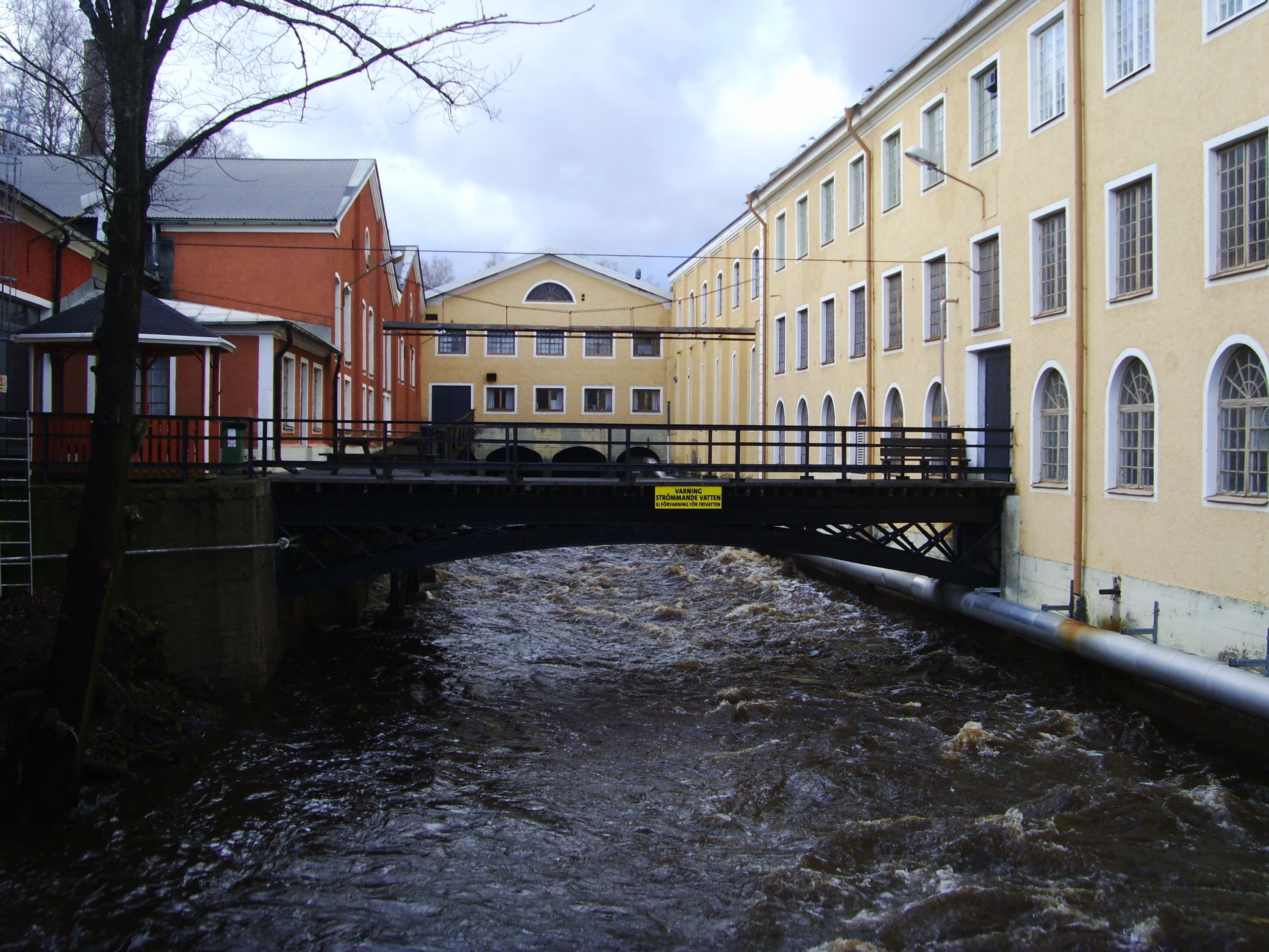 Bruksmiljön i Finspång